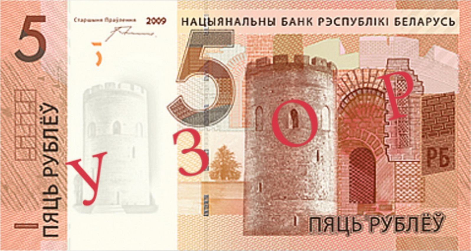 Купюра 5р